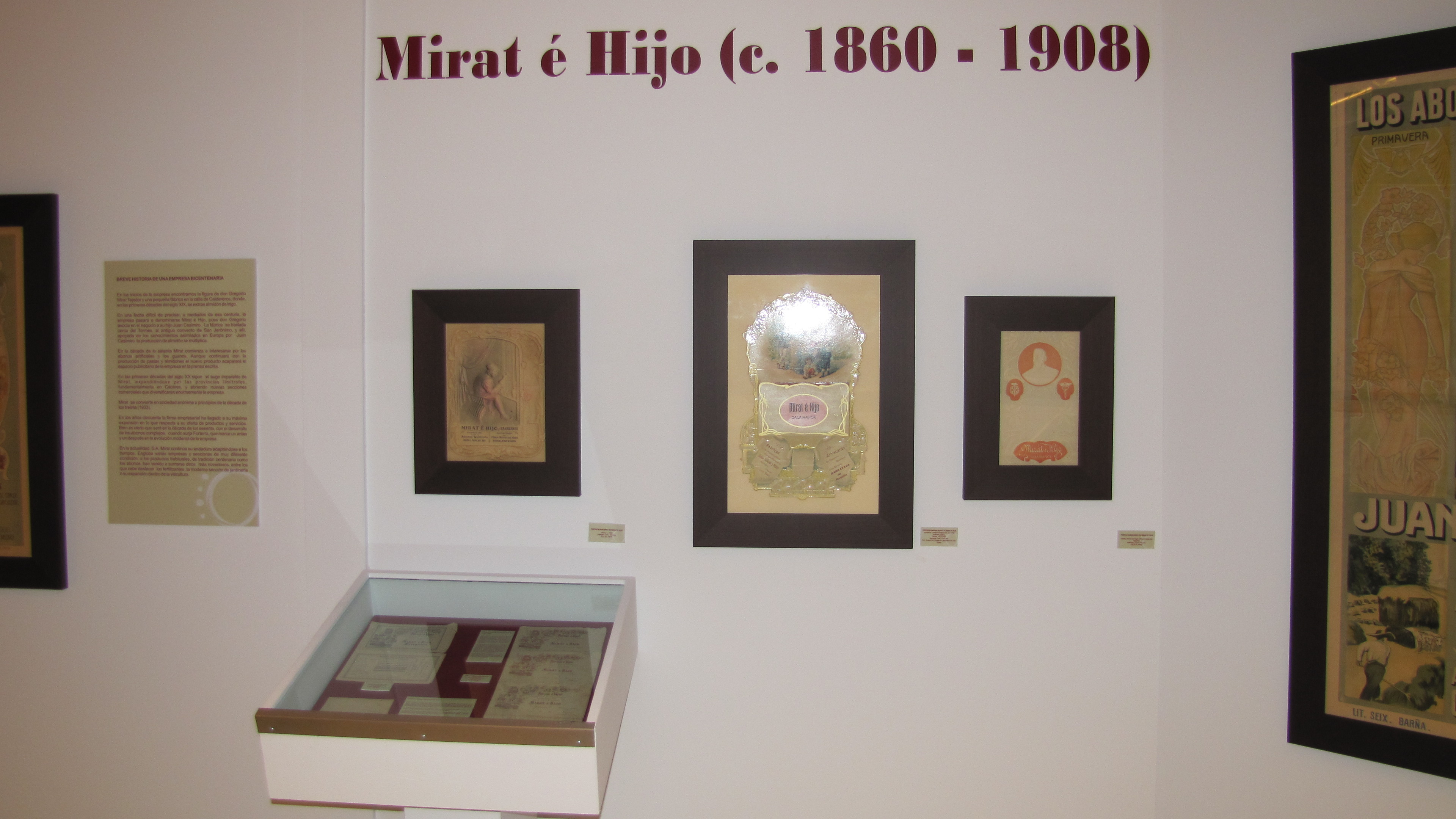 Exposición 160 años de publicidad fabril S.A. Mirat, en el Museo del Comercio de Salamanca. Zona de documentos entre 1860 y 1908, con algunos posters. Museo del Comercio y la Industria Native nameMuseo del Comercio y la Industria (Salamanca)LocationSalamanca, (Spain)Coordinates40° 57′ 54.29″ N, 5° 39′ 14.79″ W Established2006Web page control : Q6034415 VIAF: 169904596 BNE: XX4875307 institution QS:P195,Q6034415